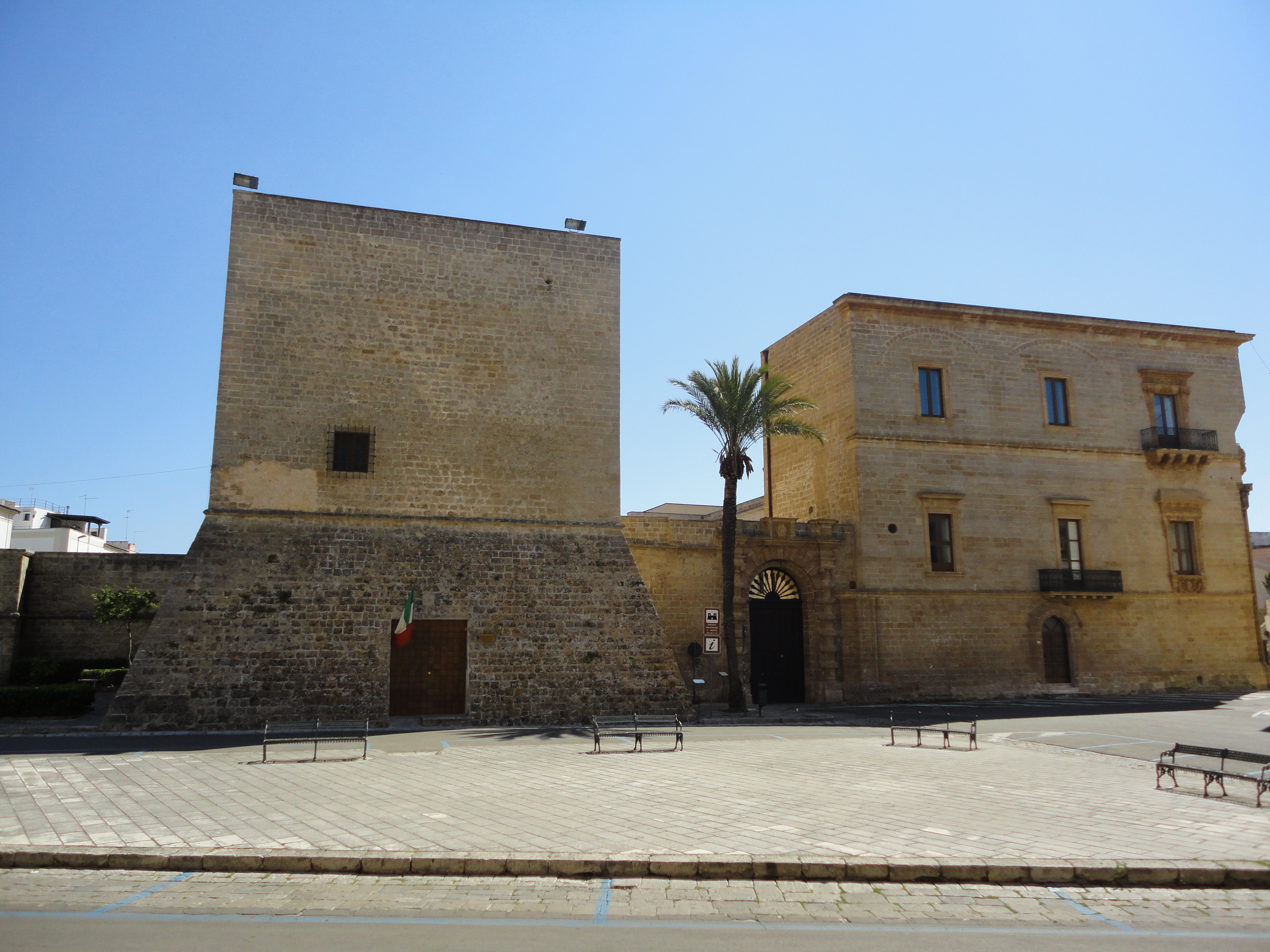 Palazzo marchesale di Galatone, Lecce